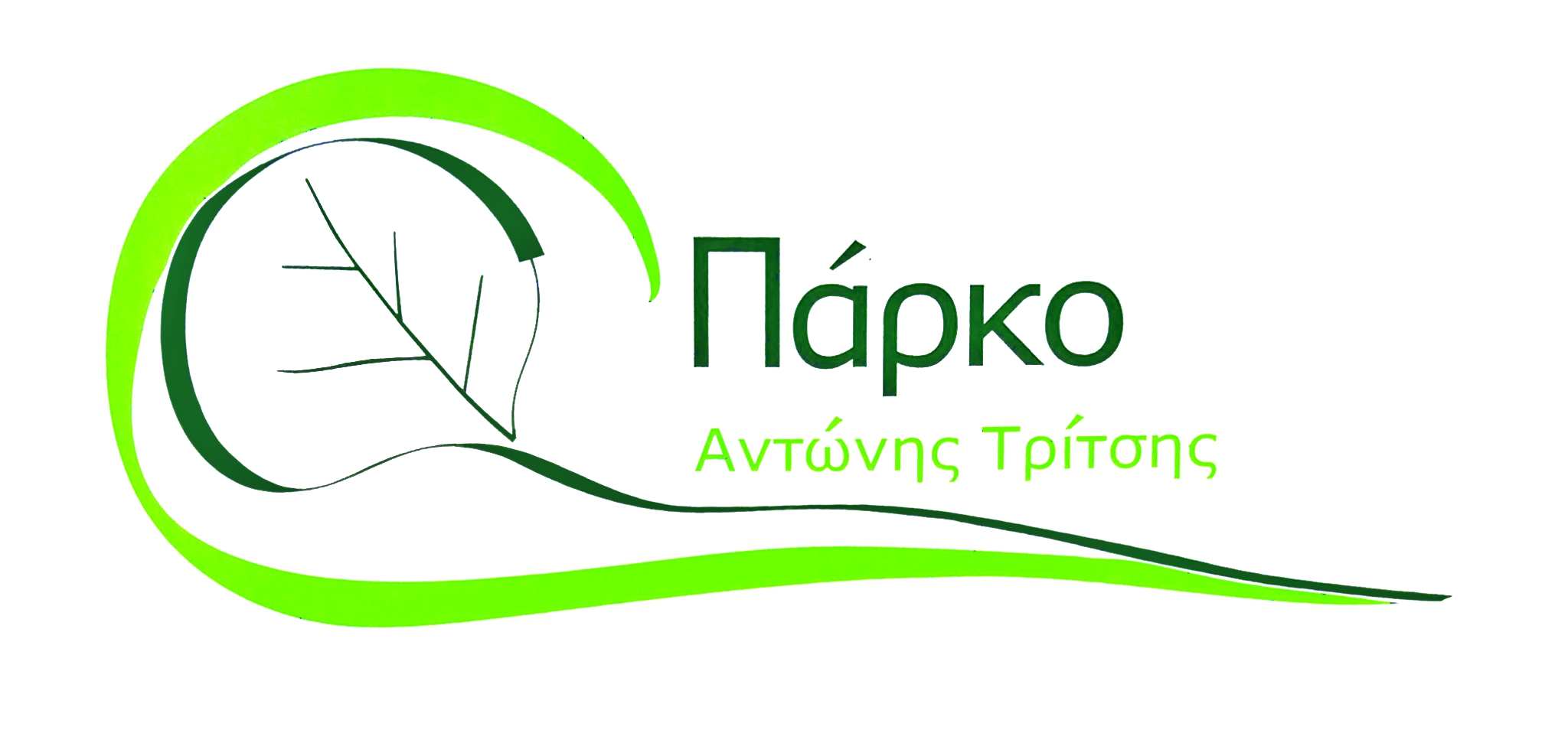 Offizielles Parklogo.